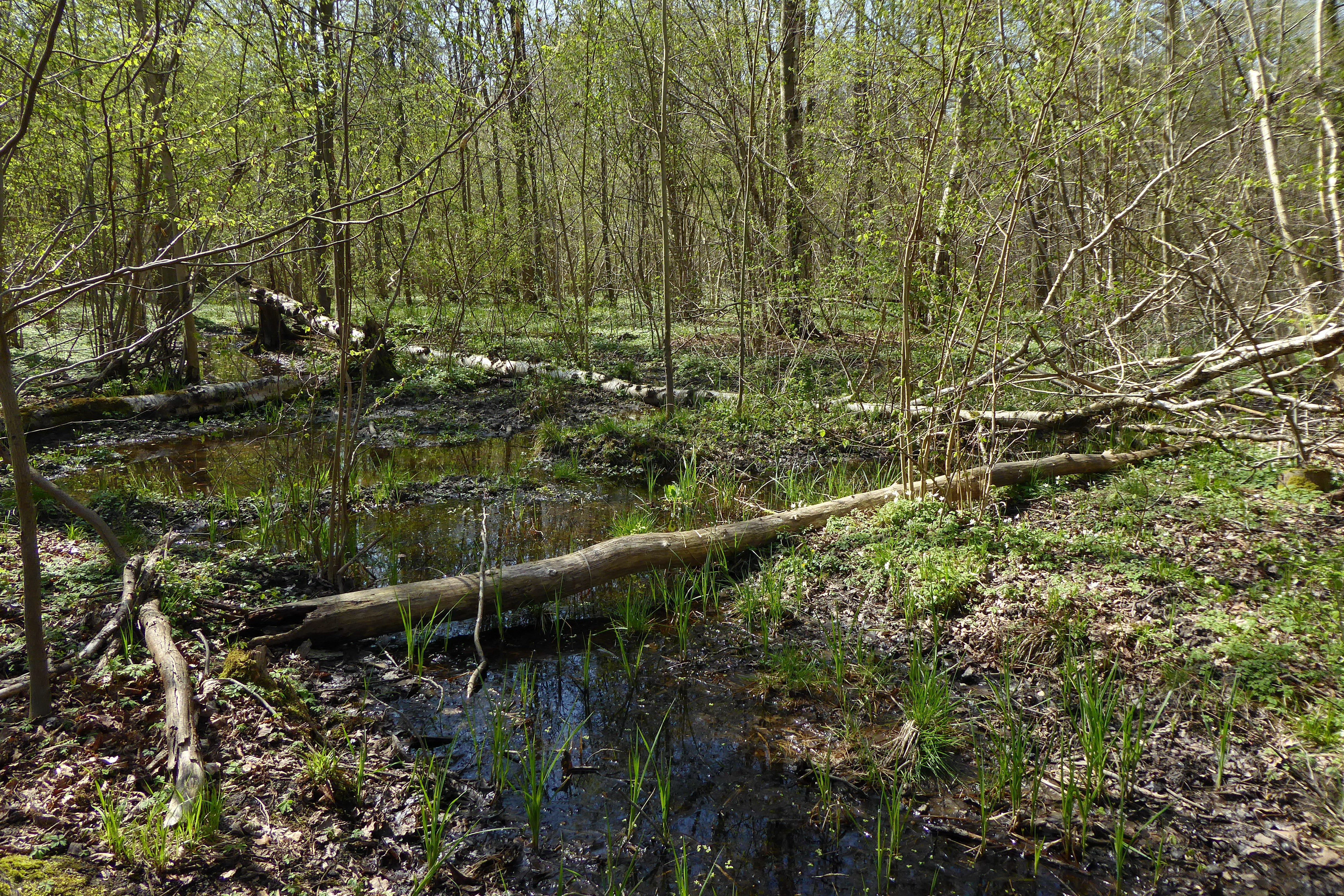 Naturschutzgebiet Gaim (NSG-HA 165): Totholz, nasse Senken und Frühblüher sind charakteristisch für dieses Naturschutzgebiet.